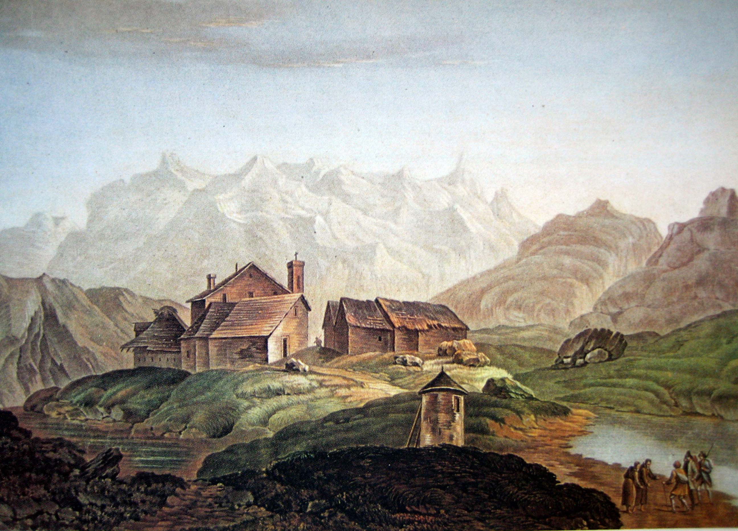 Gotthardhospiz, 1785, kol. Kupferstich von Descourtis nach Zeichnung von Rosenberg